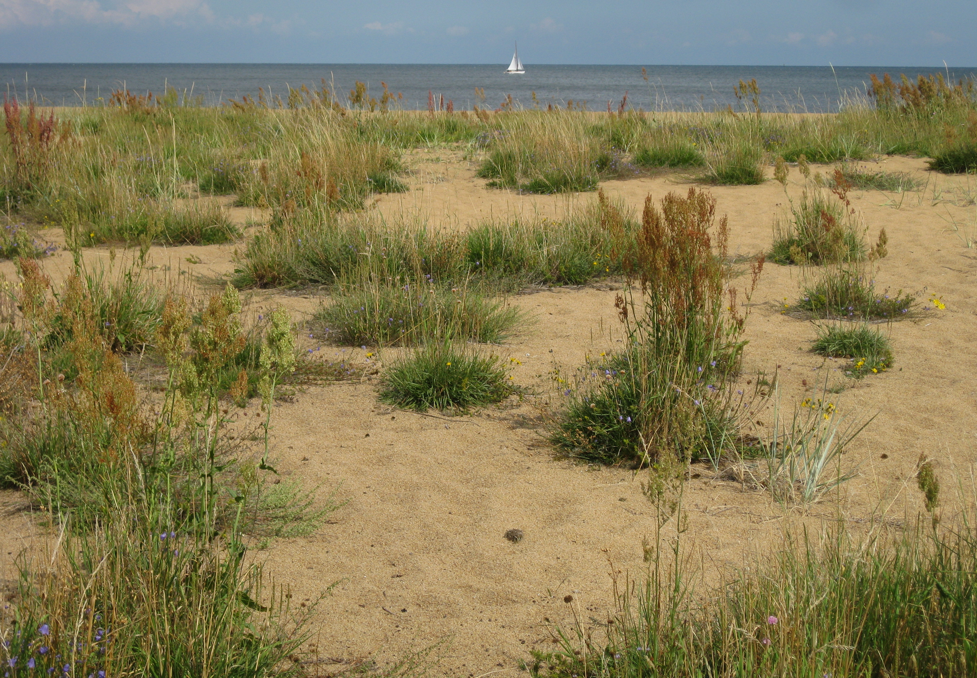 Stranden vid Tobisborg strax norr om Simrishamn